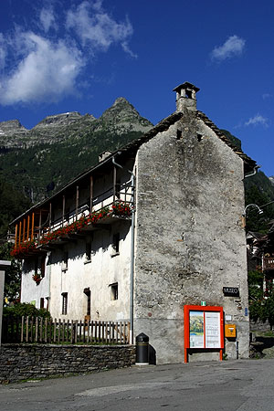 Museo in Sonogno